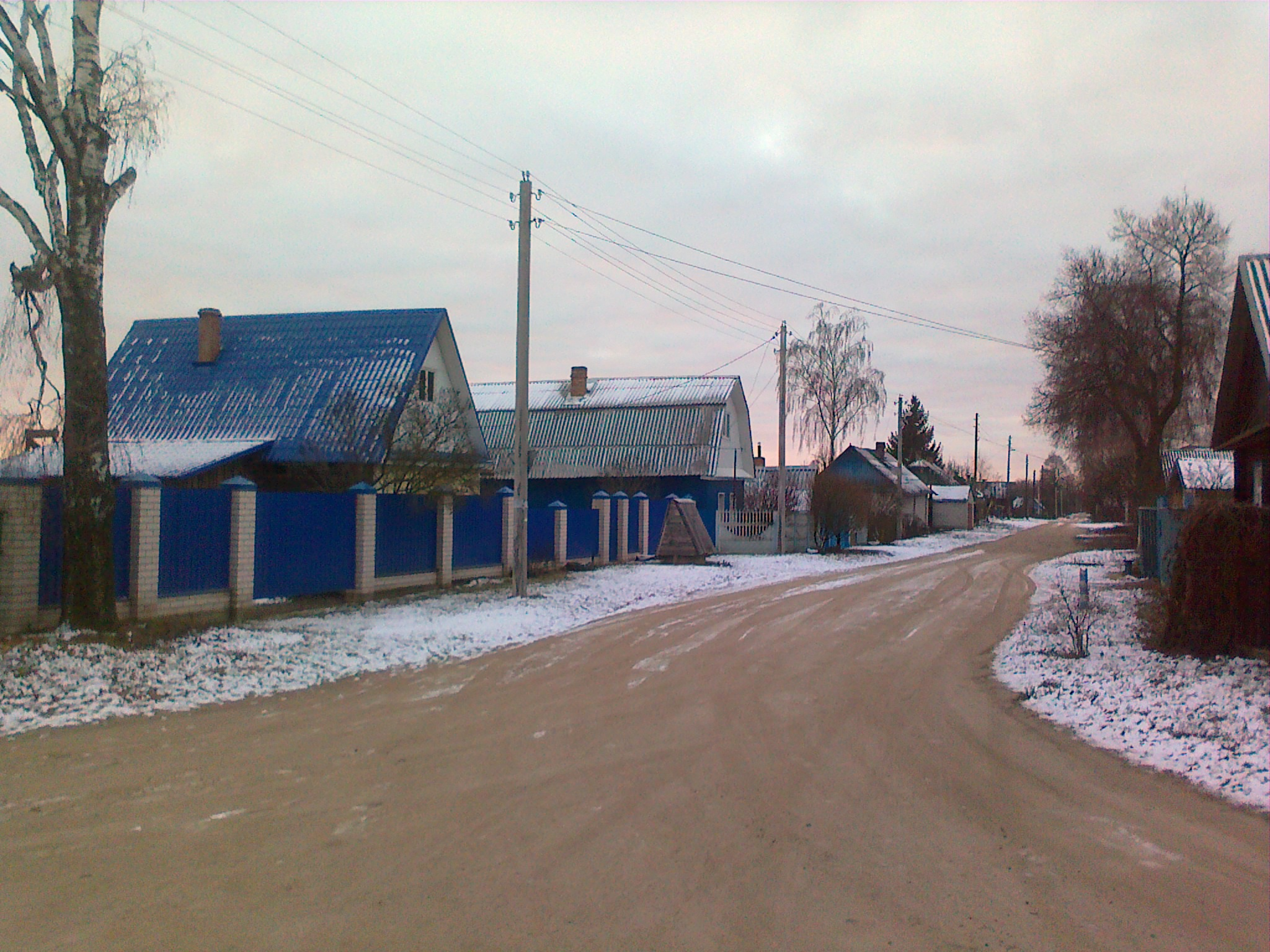 деревня Старая Шараевщина